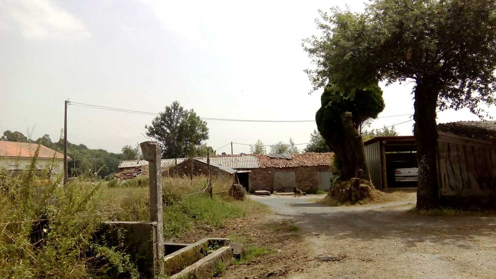 Vista de Baldarís, Curtis.